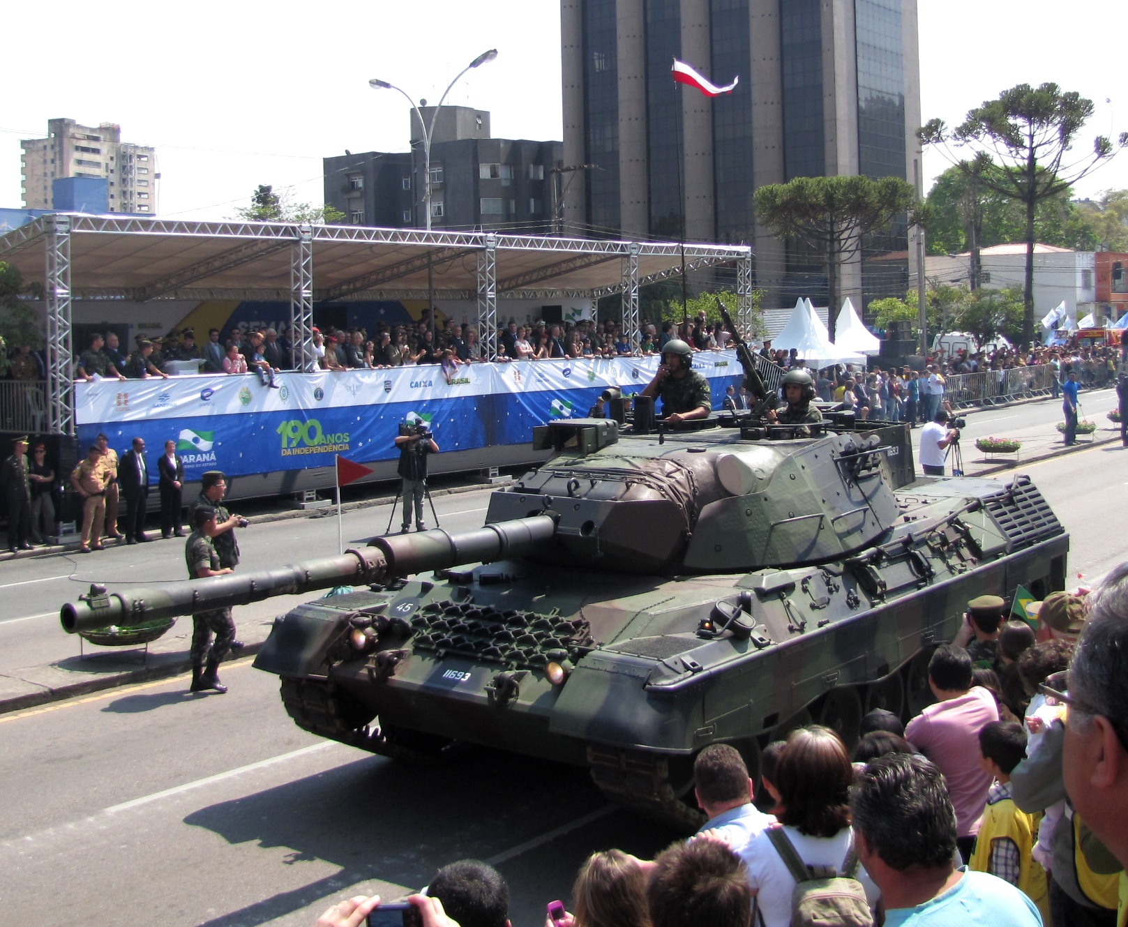 5ª RM - Viatura Leopard